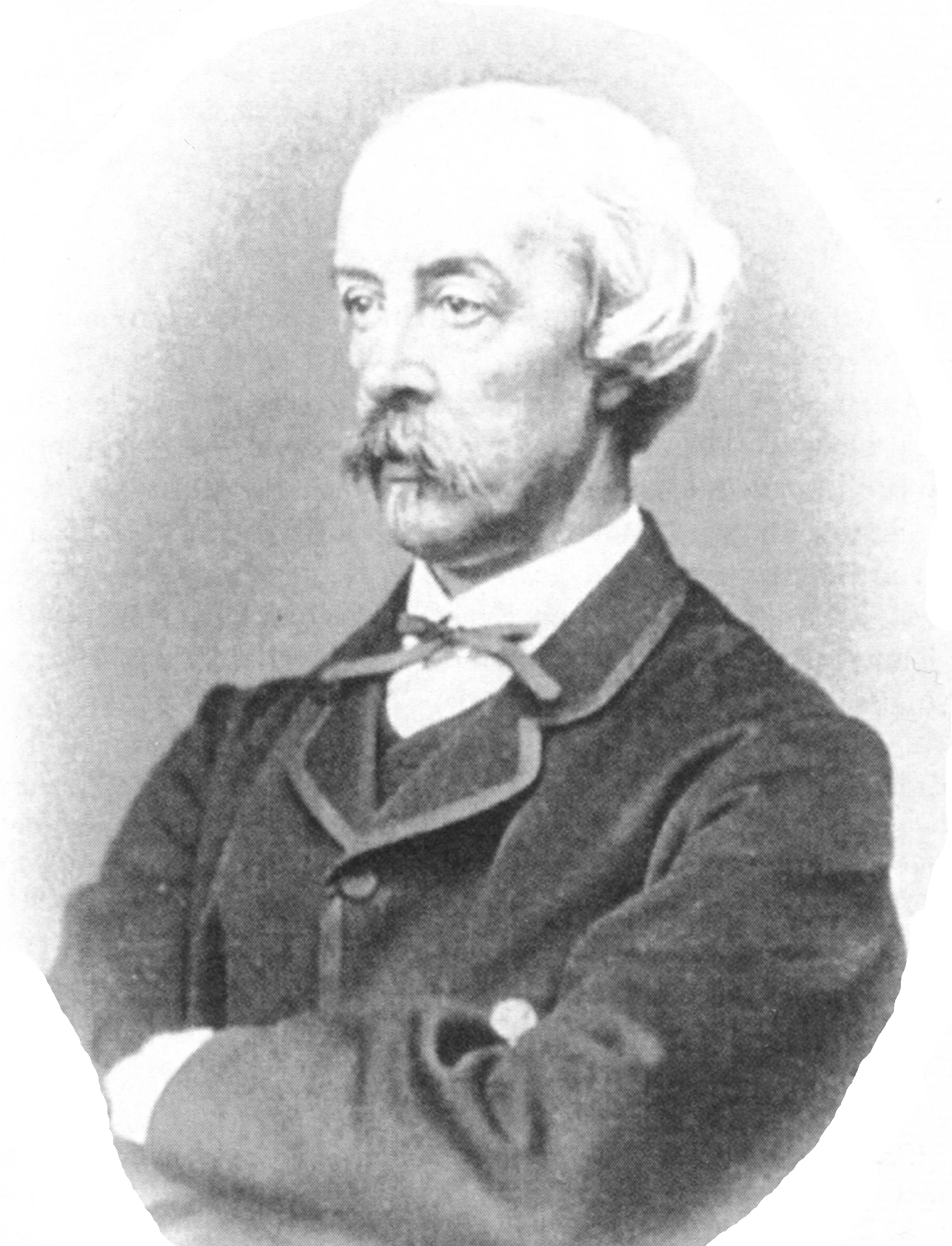 Portrait, entstanden um 1875